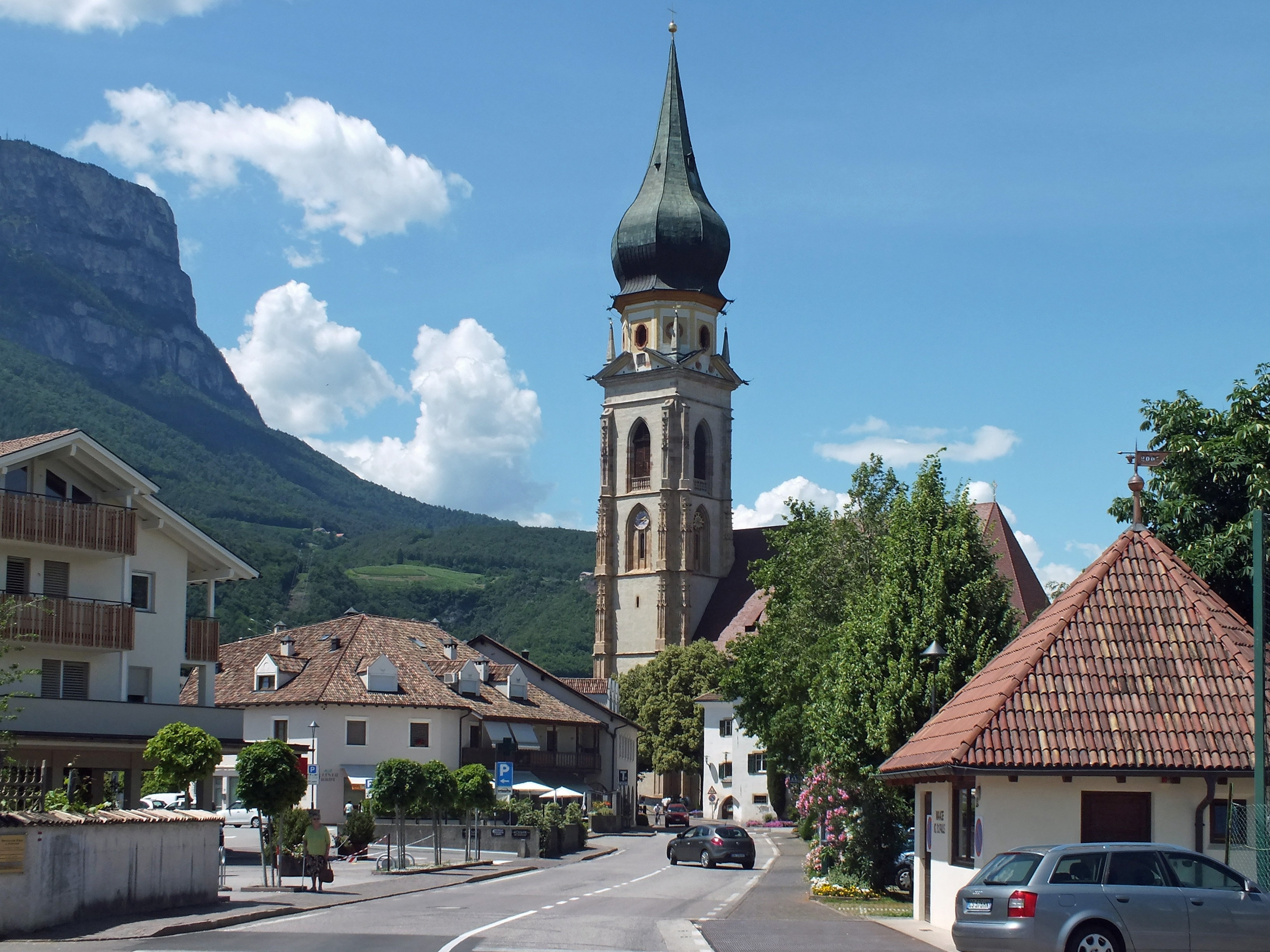 Die Pfarrkirche in St. Pauls, Eppan, Südtirol. Links im Hintergrund der Gantkofel.